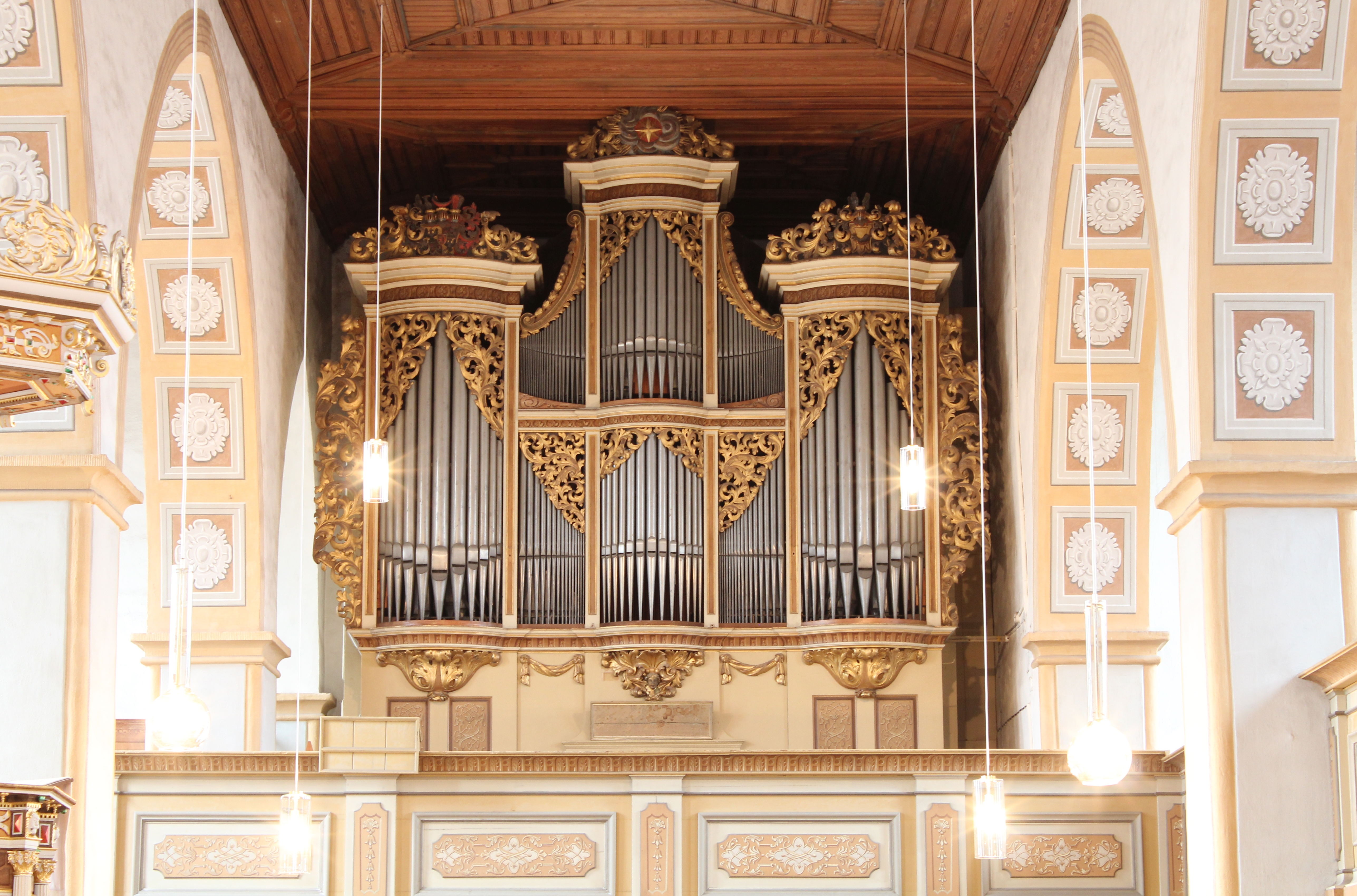 한국어 (조선): 뢰타 게오르겐교회 질버만오르간 1721년 제작